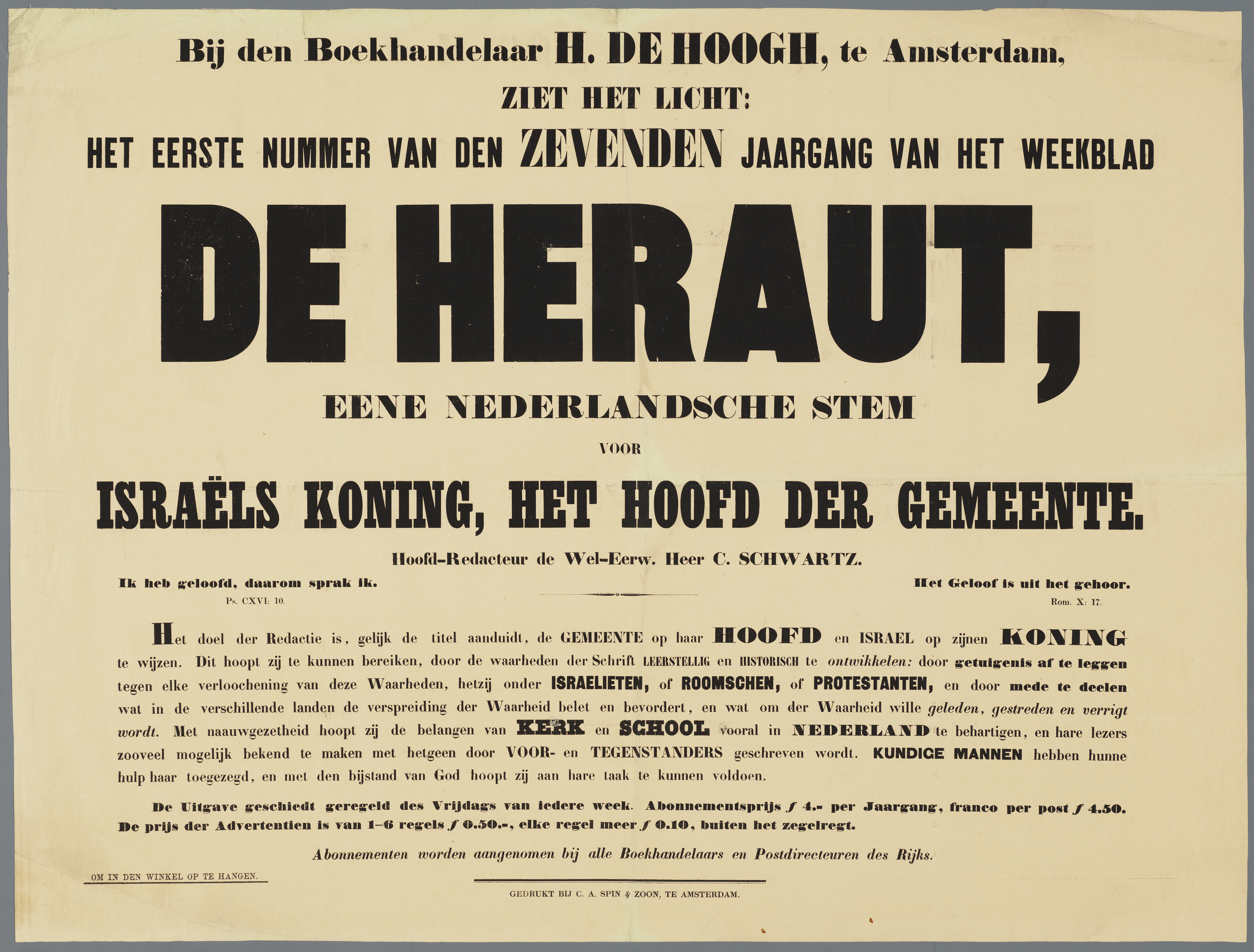 De heraut, een nederlandsche stem Titel: de heraut, een nederlandsche stem Materiaal: inkt, papier Techniek: lithografie (?) Vervaardiger: Spin & zoon, C.A., Amsterdam (drukker) Datering: ca. 1857 Afmetingen: 49.5 x 66 (cm) Inventarisnummer: Pr. A 340